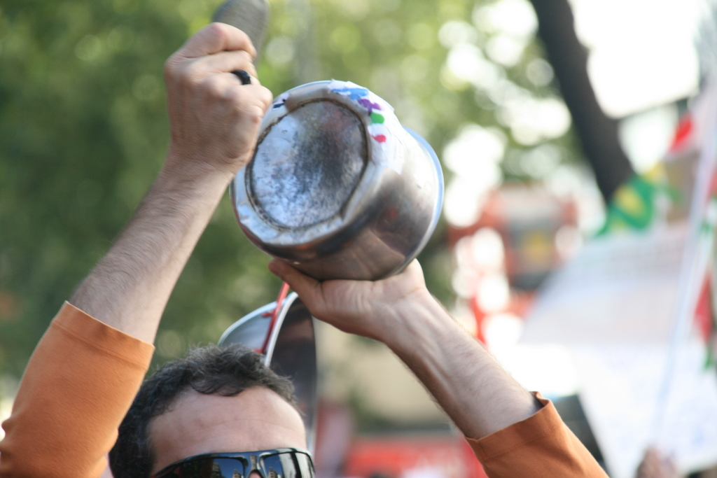 Huelga General (2012-11-14) 16